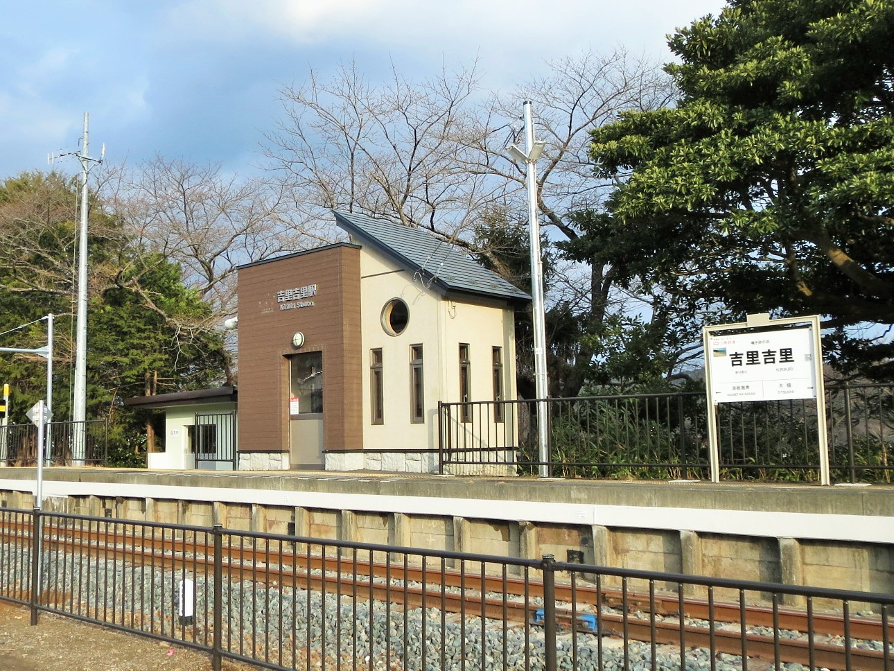 大槌町にある吉里吉里駅 Canon IXY 3